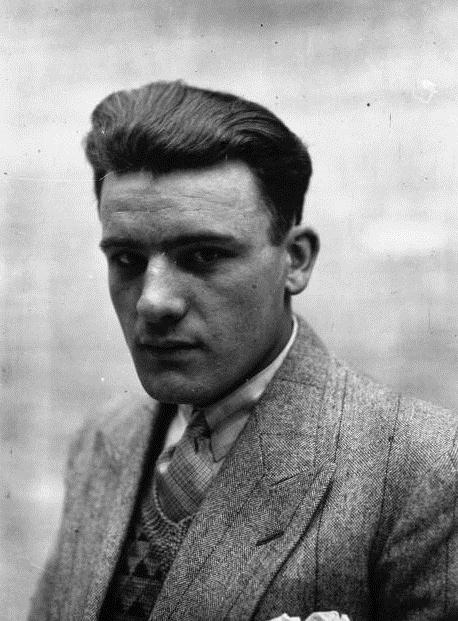 Wambst, portrait